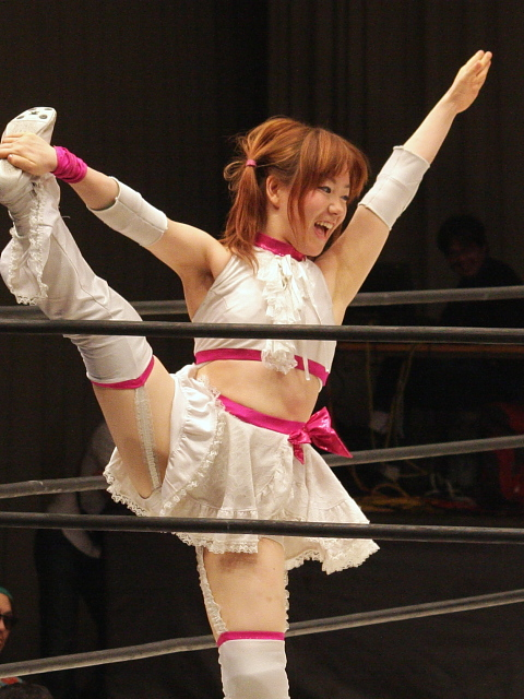 アイスリボン所属女子プロレスラー 松本都